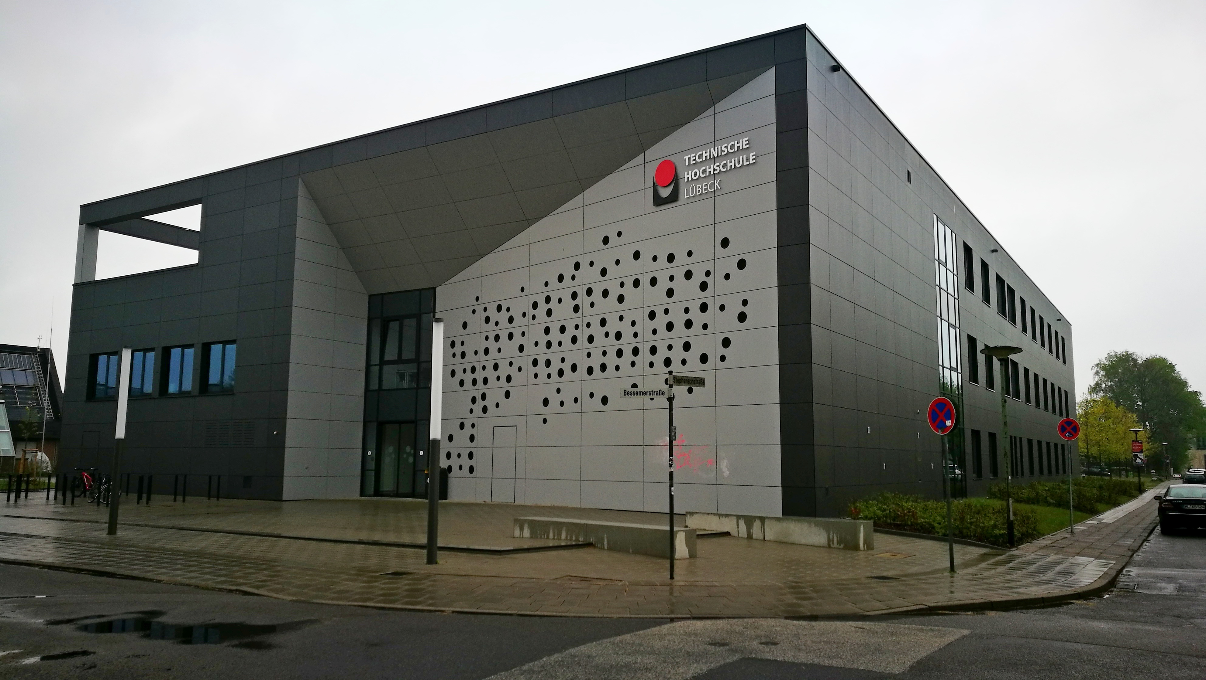 TH Lübeck / neues Hörsaalgebäude